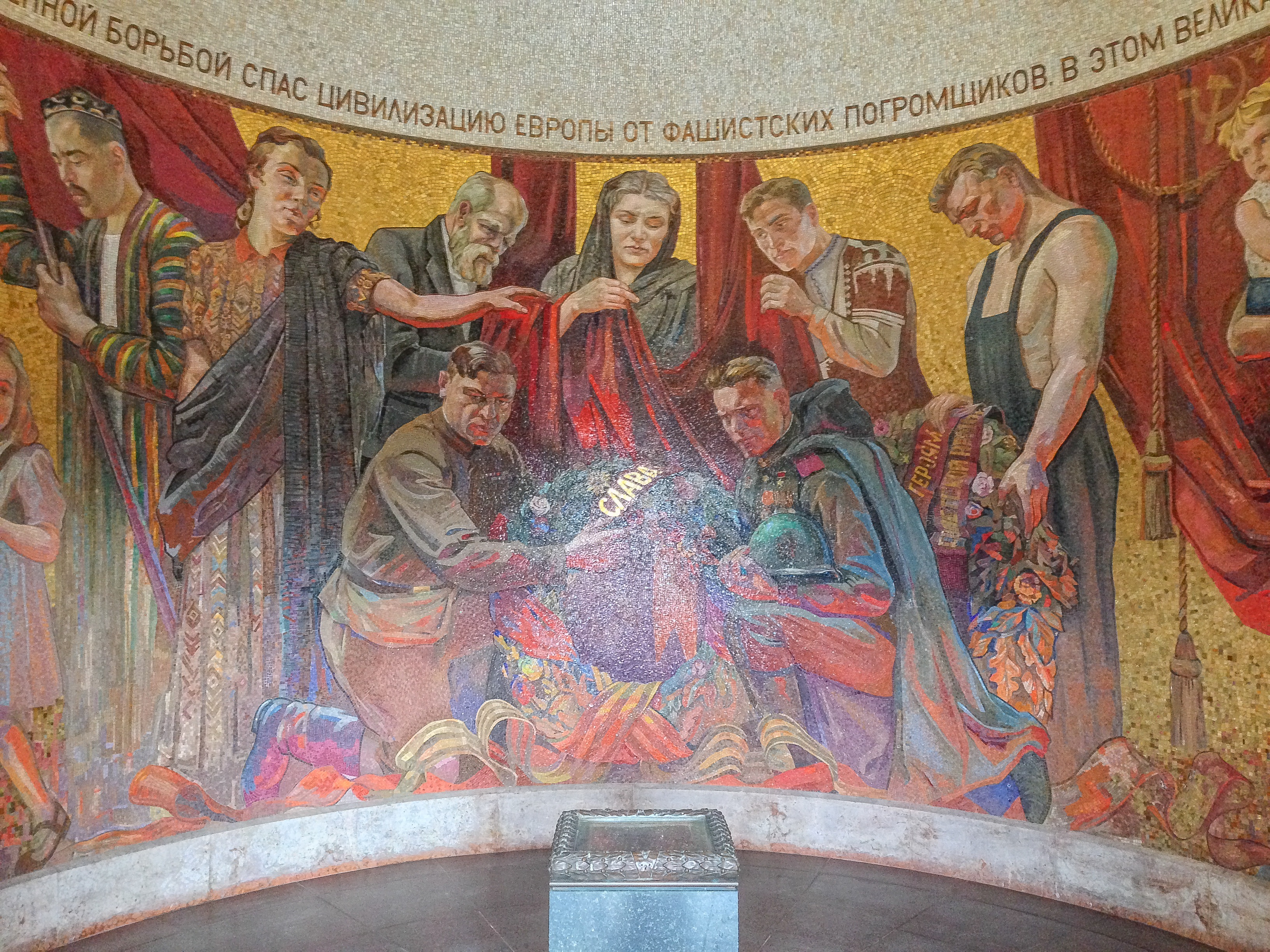 Innenansicht des Pavillons in der Hauptstatue des sowjetischen Ehrenmals im Treptower Park, Berlin (Februar 2014)